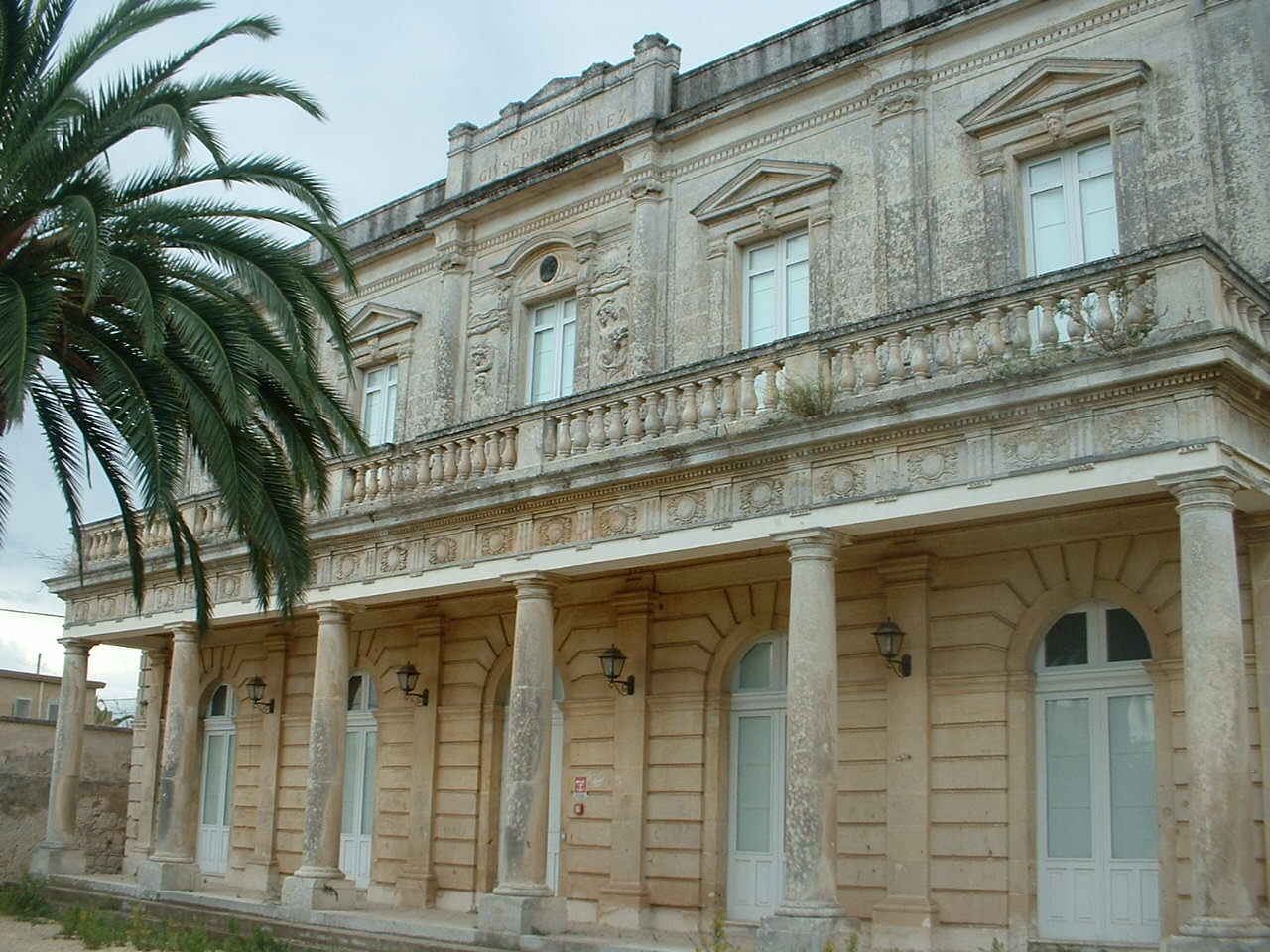 Solarino (SR), The Vasquez Hospital (1929)